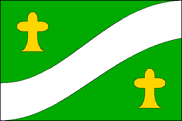 vlajka, Dobšice, okres Znojmo